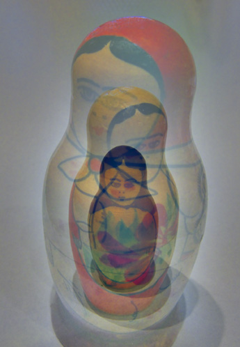 Die bekannte russische Figur in der Figur in der Figur